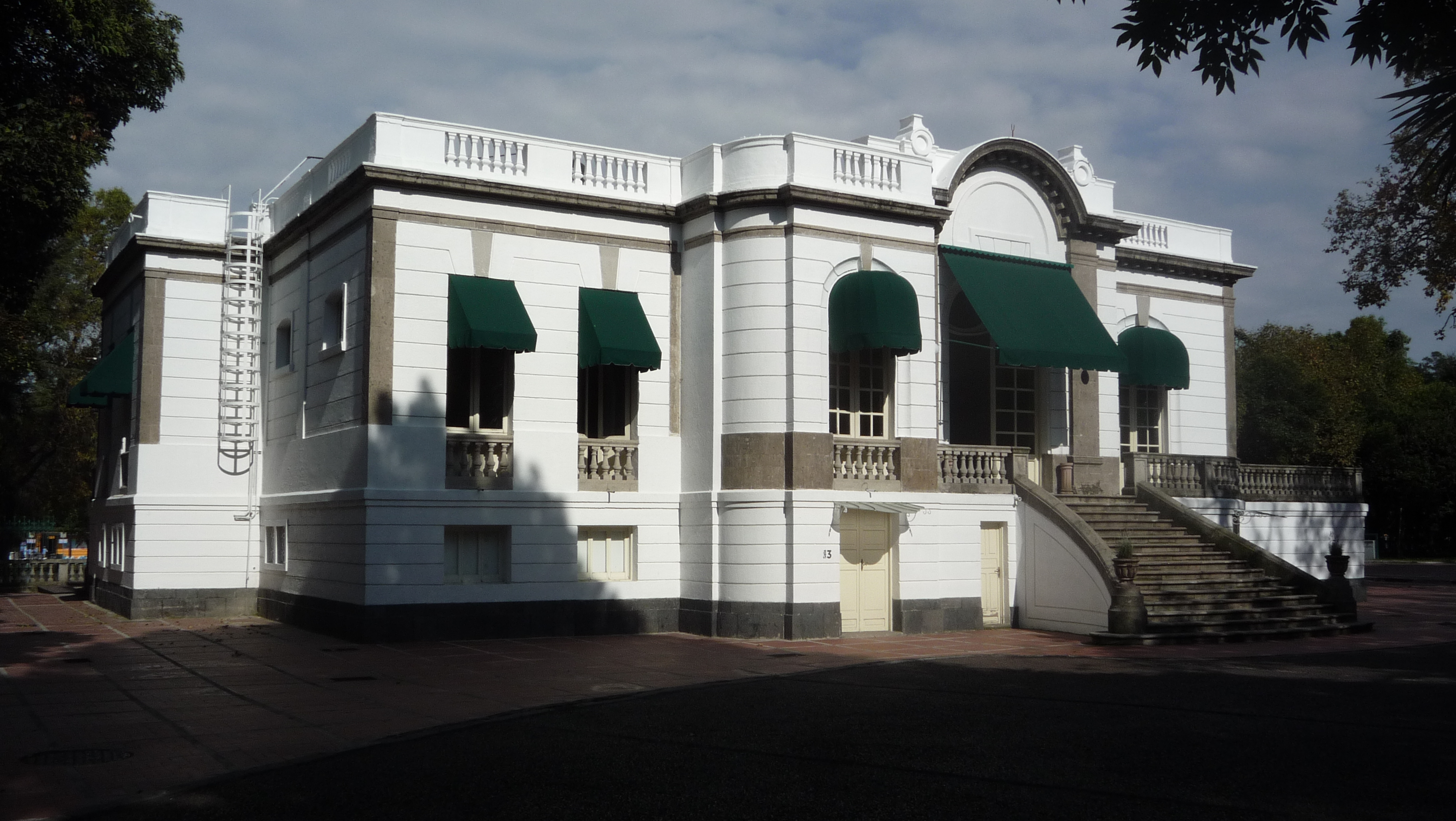 Tomada desde un angulo lateral de los jardines de la casa